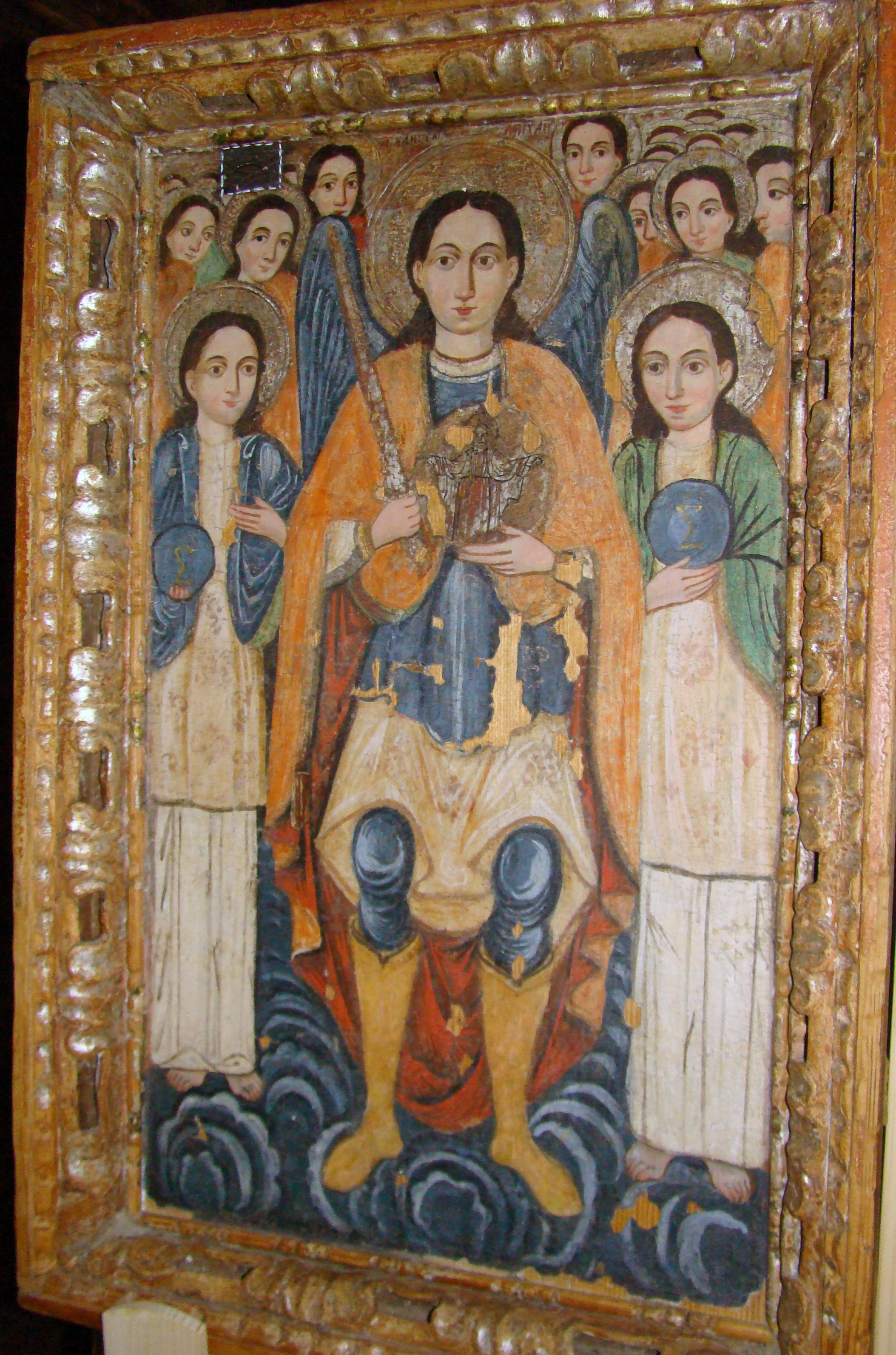 Biserica de lemn "Sf. Arhangheli", oraș Borșa, Str. Eternității 1